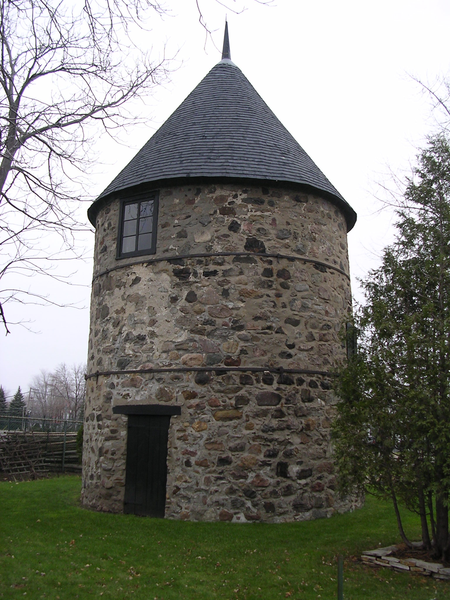 Moulin à vent Antoine-Jetté, situé à Repentigny (Lanaudière, Québec). Il est connu aussi sous le nom de Moulin Séguin. Moulin à farine; moulin Jetté.